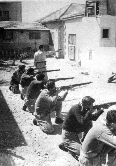 לוחמי האצ"ל בשעת שיעור נשק בשכונת התקוה.